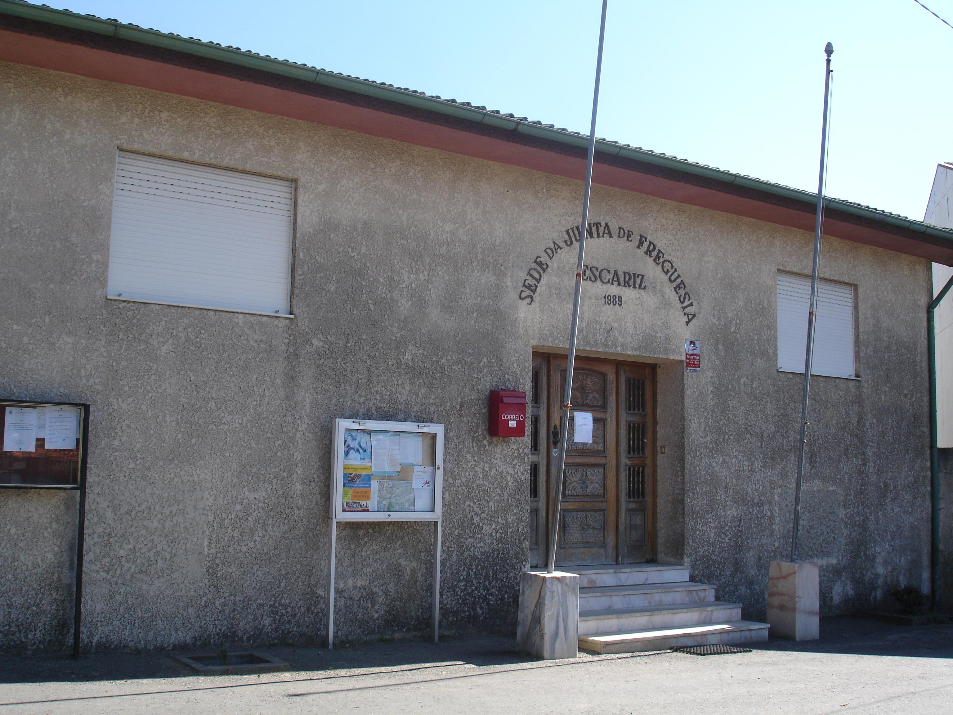 Junta de Freguesia de Escariz